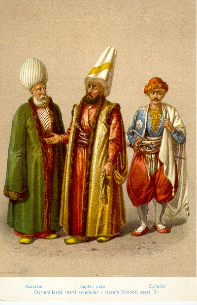 Kazasker – Kaptan Paşa – Çuhadar